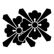 重ね剣菱